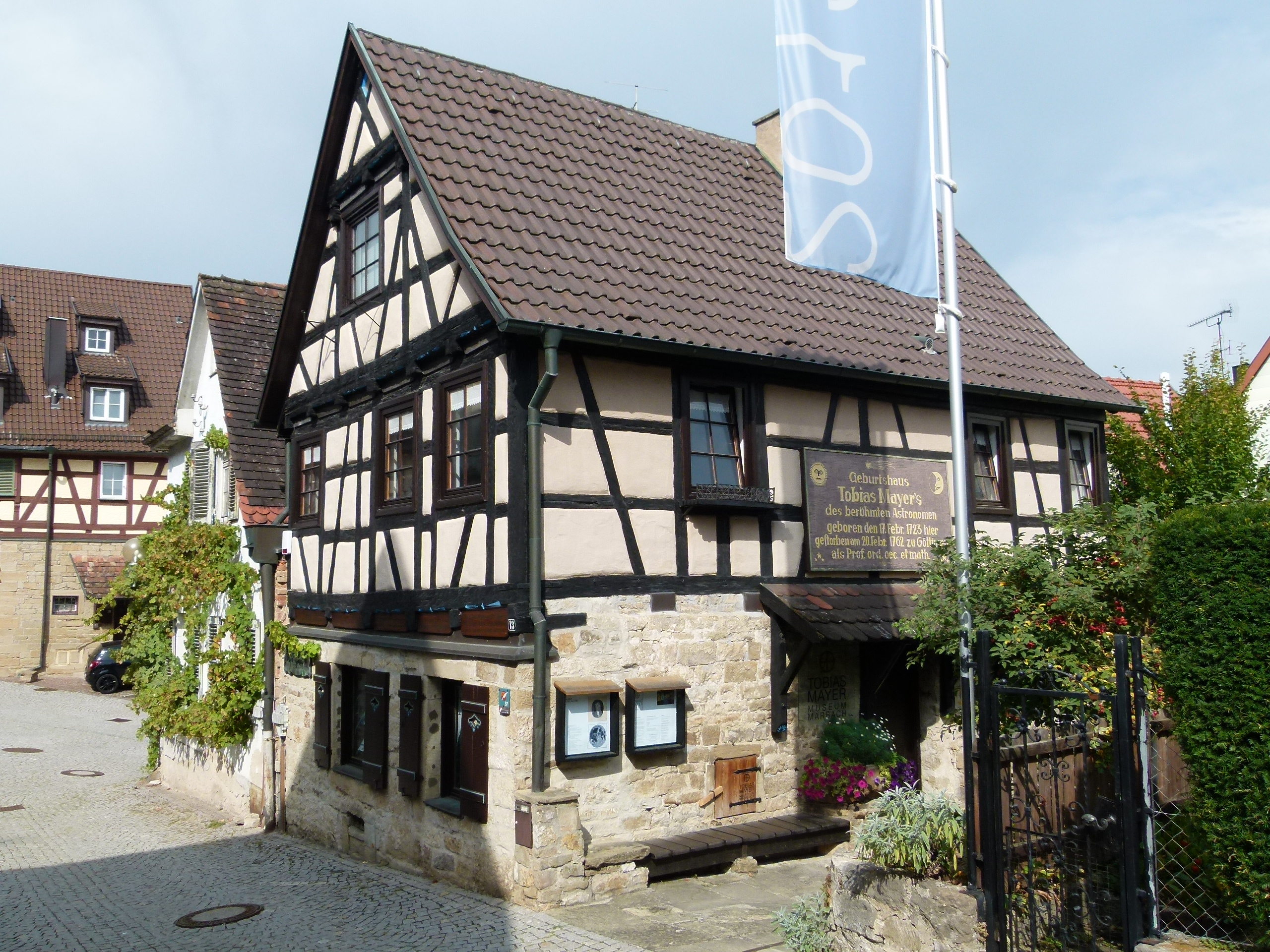 Tobias Mayer Geburtshaus, Marbach am Neckar